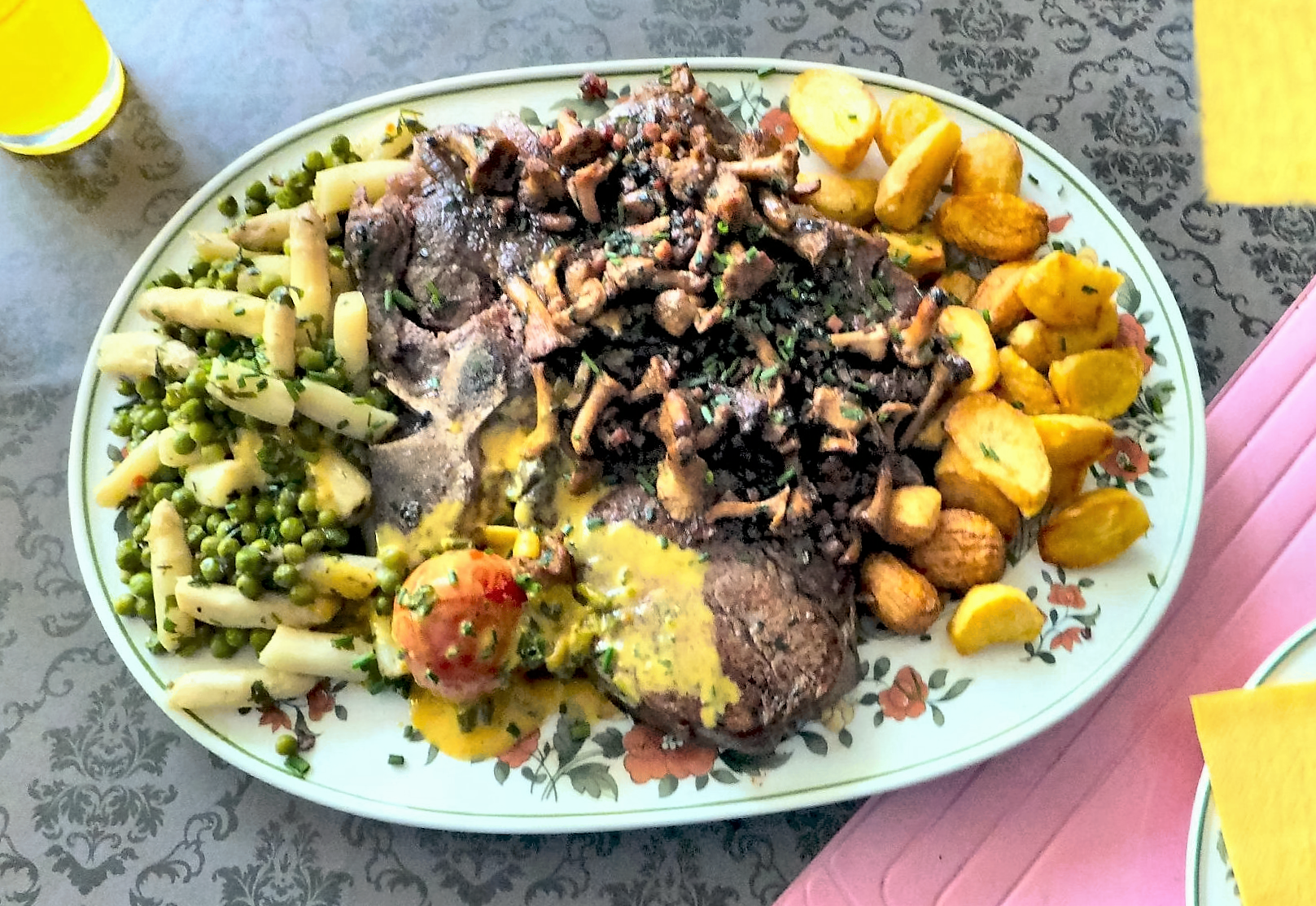 T-Bone-Steak mit Pfifferlingen, Spargel-Erbsengemüse, Backkartoffeln, Grilltomate und Sc. Hollandaise